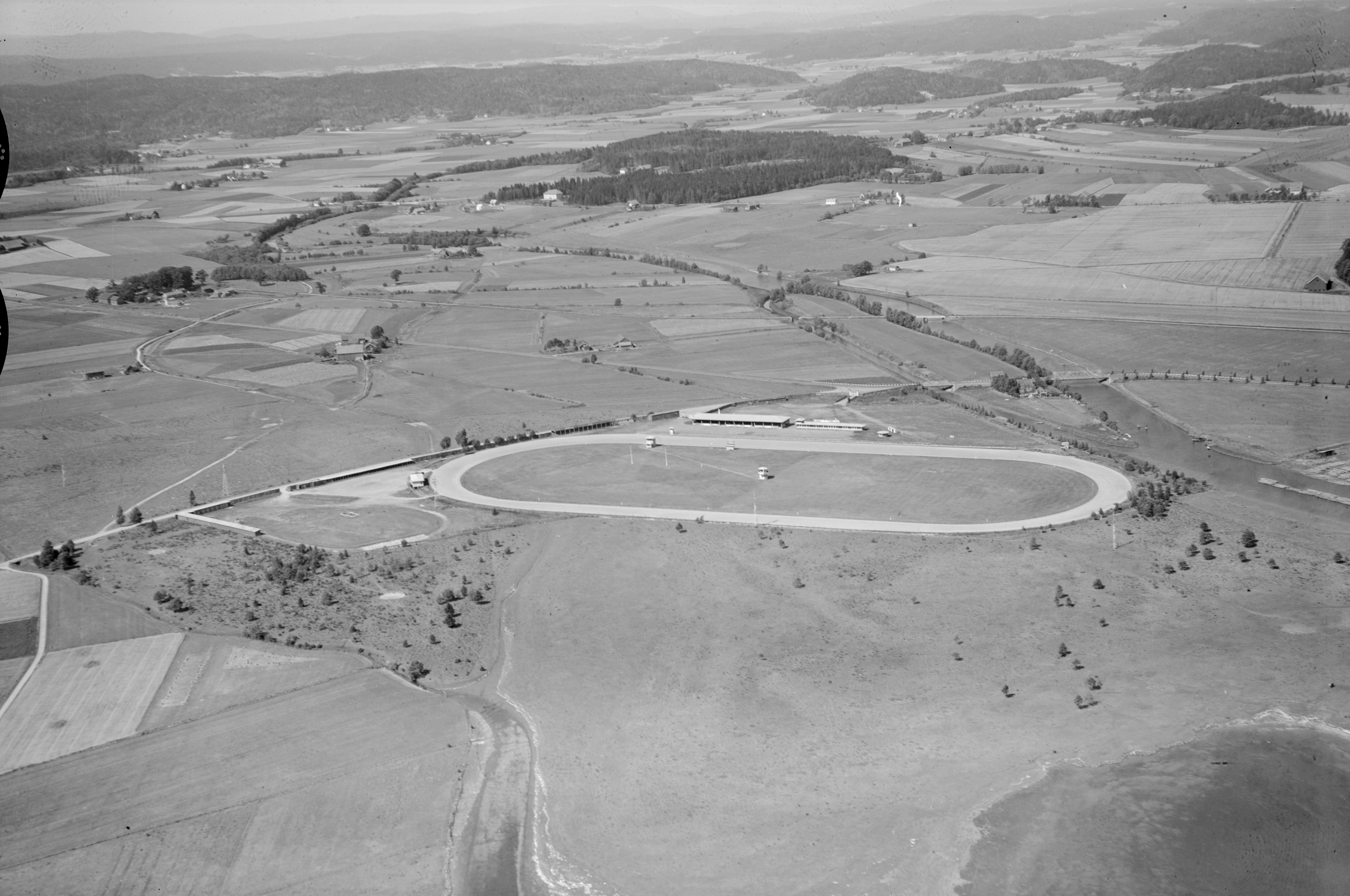 WF.S.A966